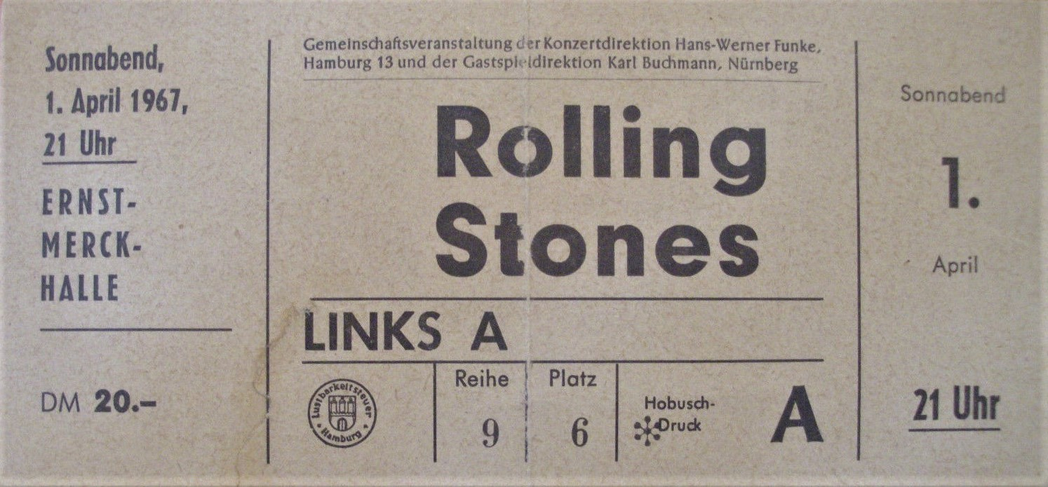 The Rolling Stones in der Ernst-Merck-Halle, Hamburg, 1. April 1967